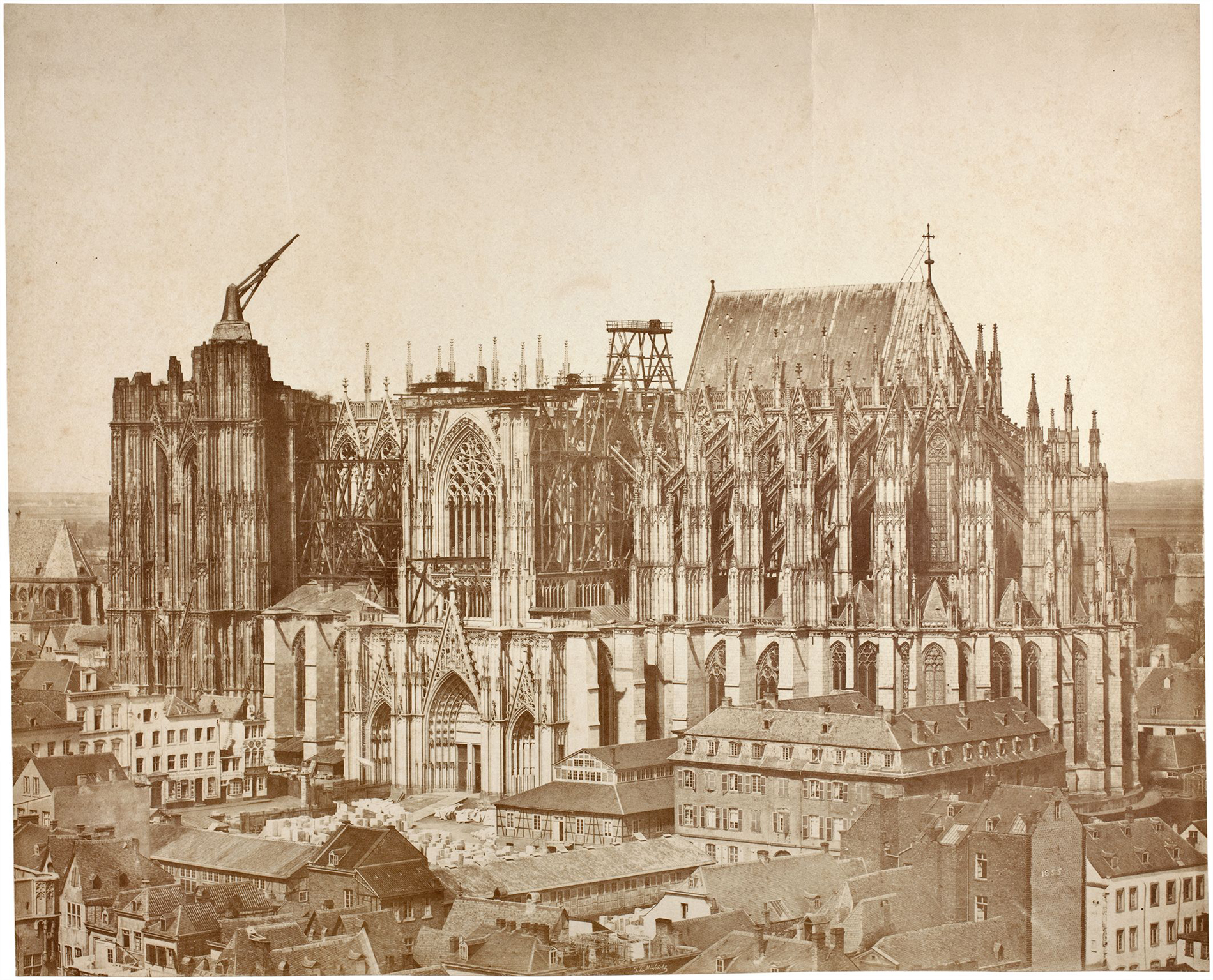 Bau des Doms, Köln, 1855 Salzpapier